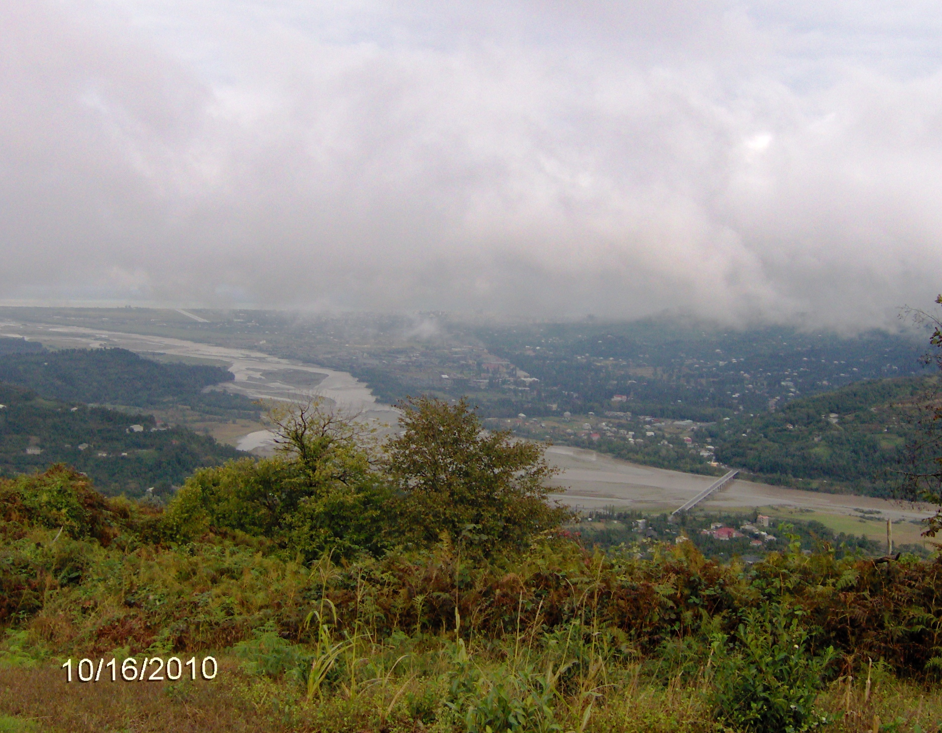 ხიდი მდინარე ჭოროხზე